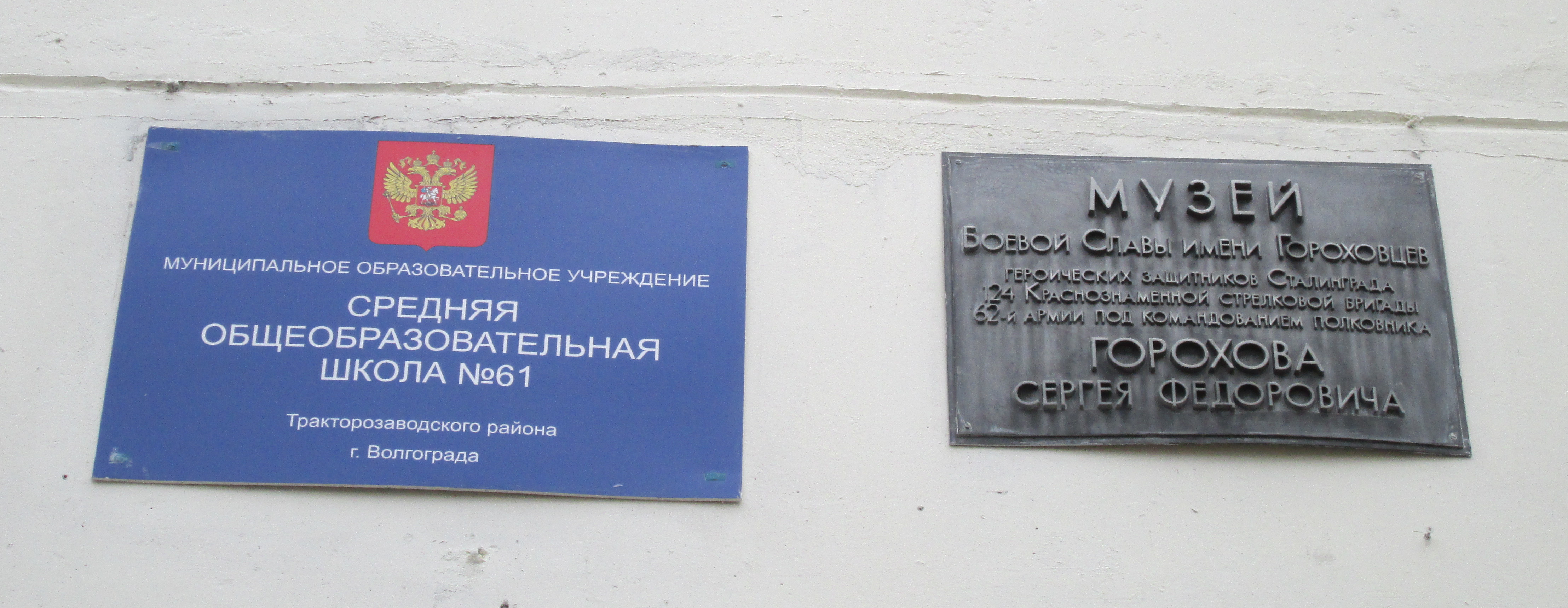 Таблички над входом в школу